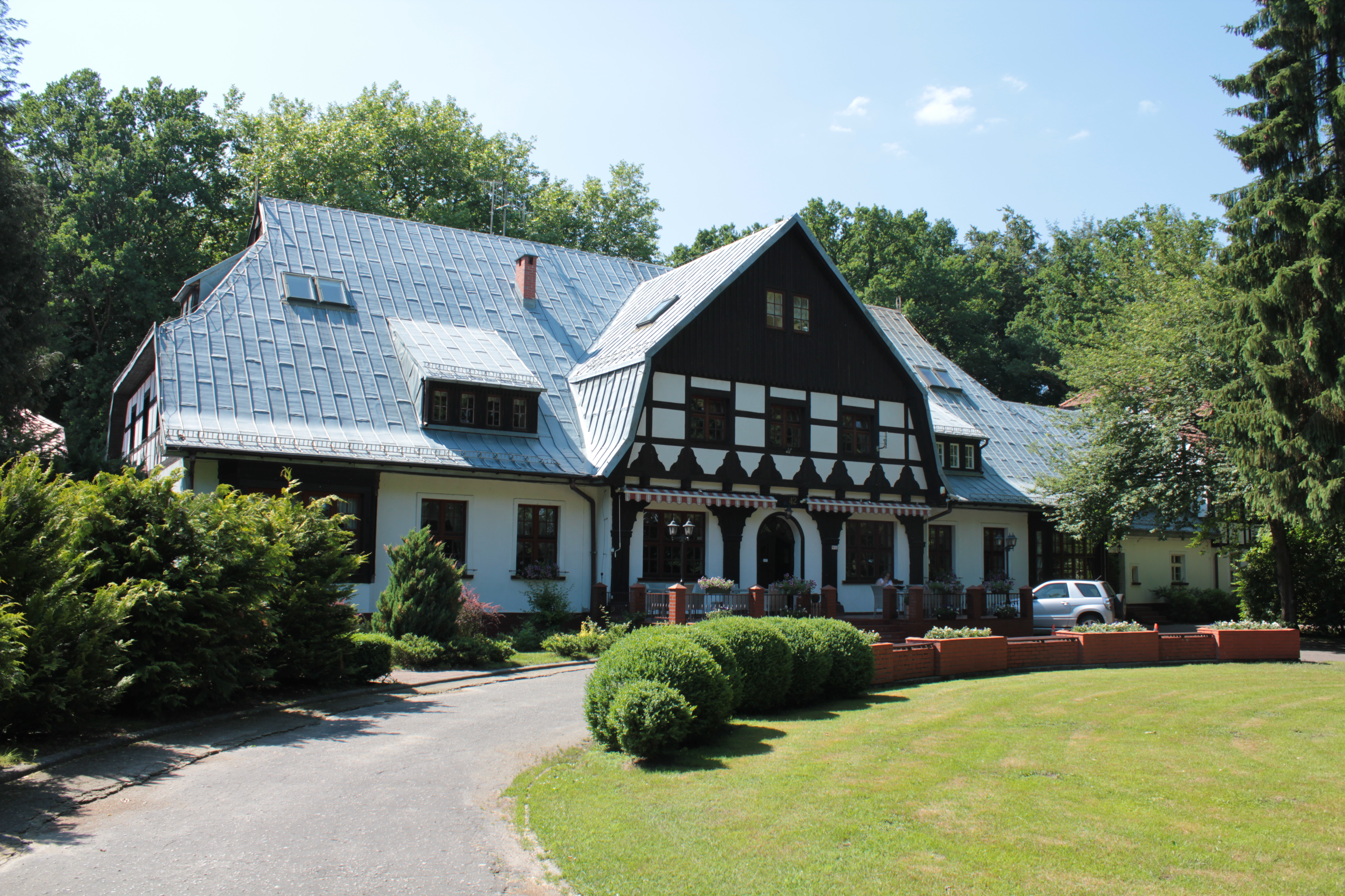 Dwor w Osiekach